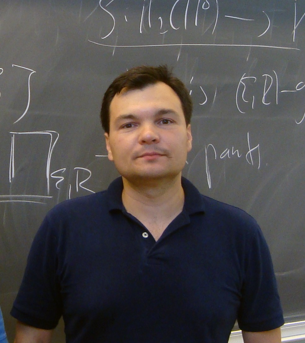 Matematikerne (Jeremy Kahn and) Vladimir Markovic under mesterklassen The Ehrenpreis conjecture i Aarhus, august 2012.